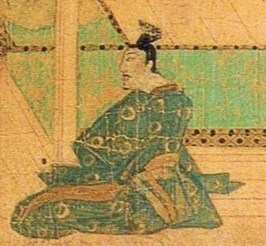 『蒙古襲来絵詞』前巻、絵十 甘縄邸の安達長景。